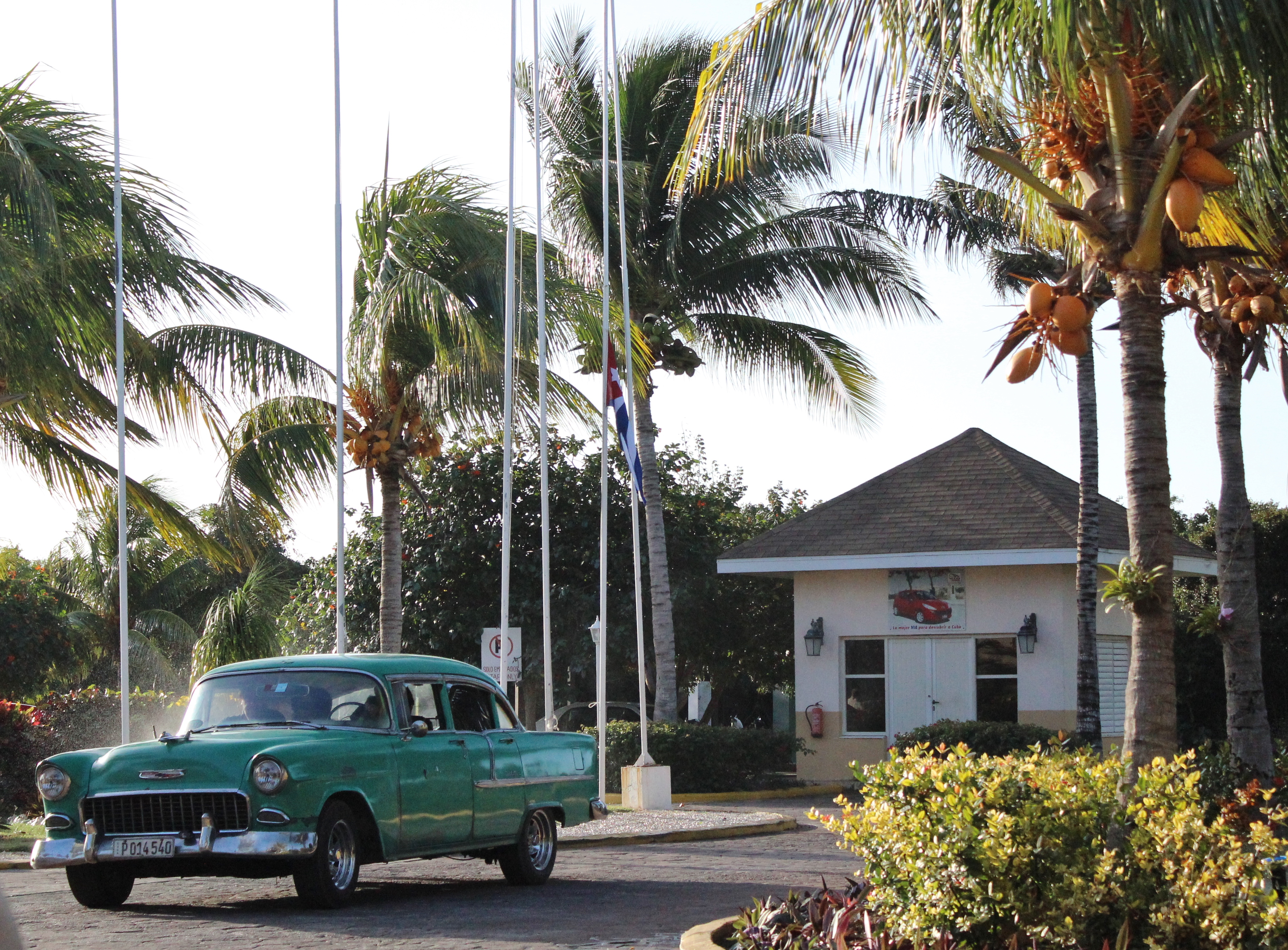 Photo prise à Cuba (santa-maria) lors du deuil national suivant la mort de Fidel Castro